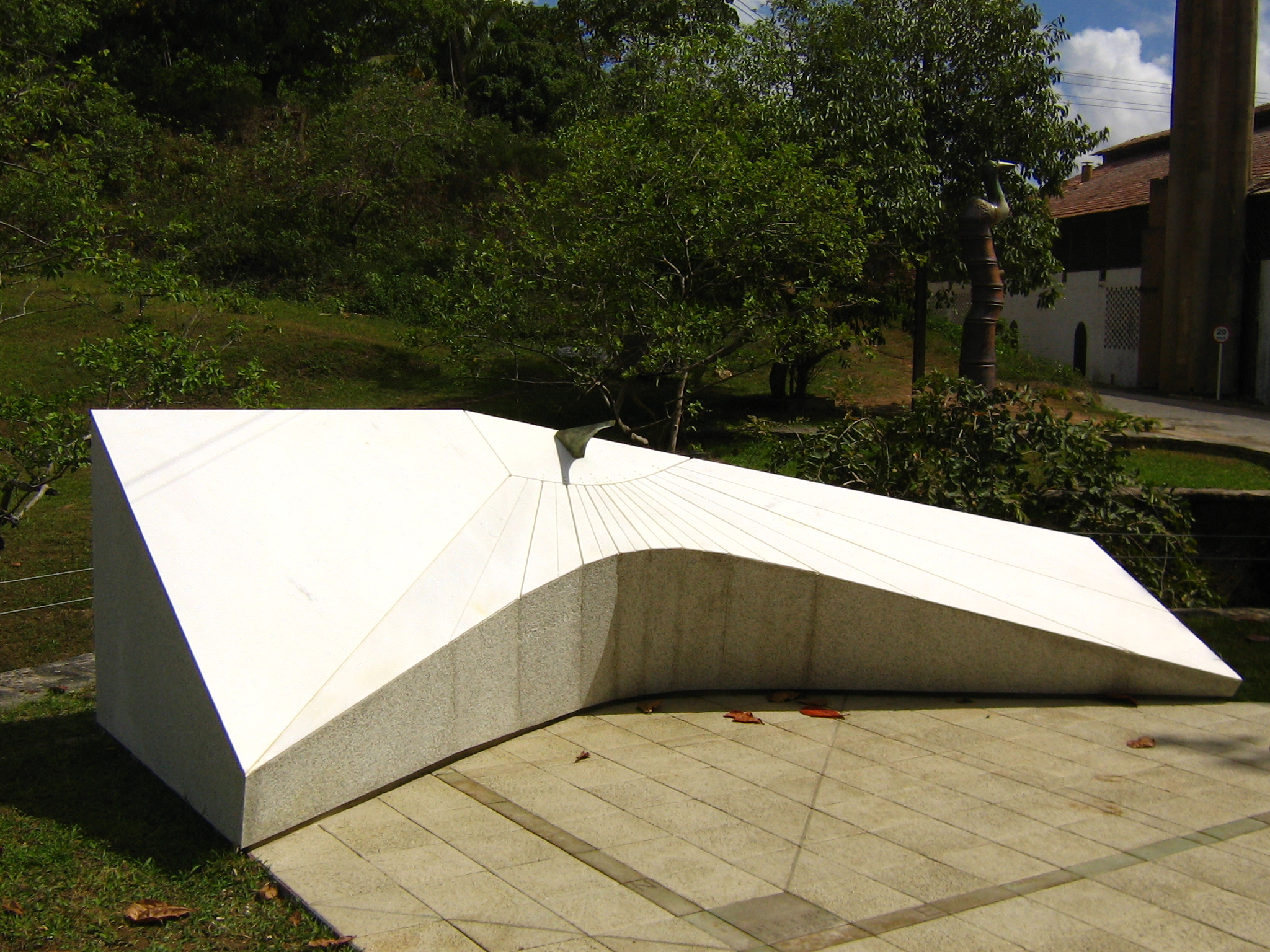 Analemmatos - Relógio solar de reclinação Sul (South reclining sundial), Oficina Cerâmica Francisco Brennand, Recife, Pernambuco, Brasil. LAT 8°03’8,5”S LON 34°58’28,8”W. Arquiteto: Fernando Almeida.